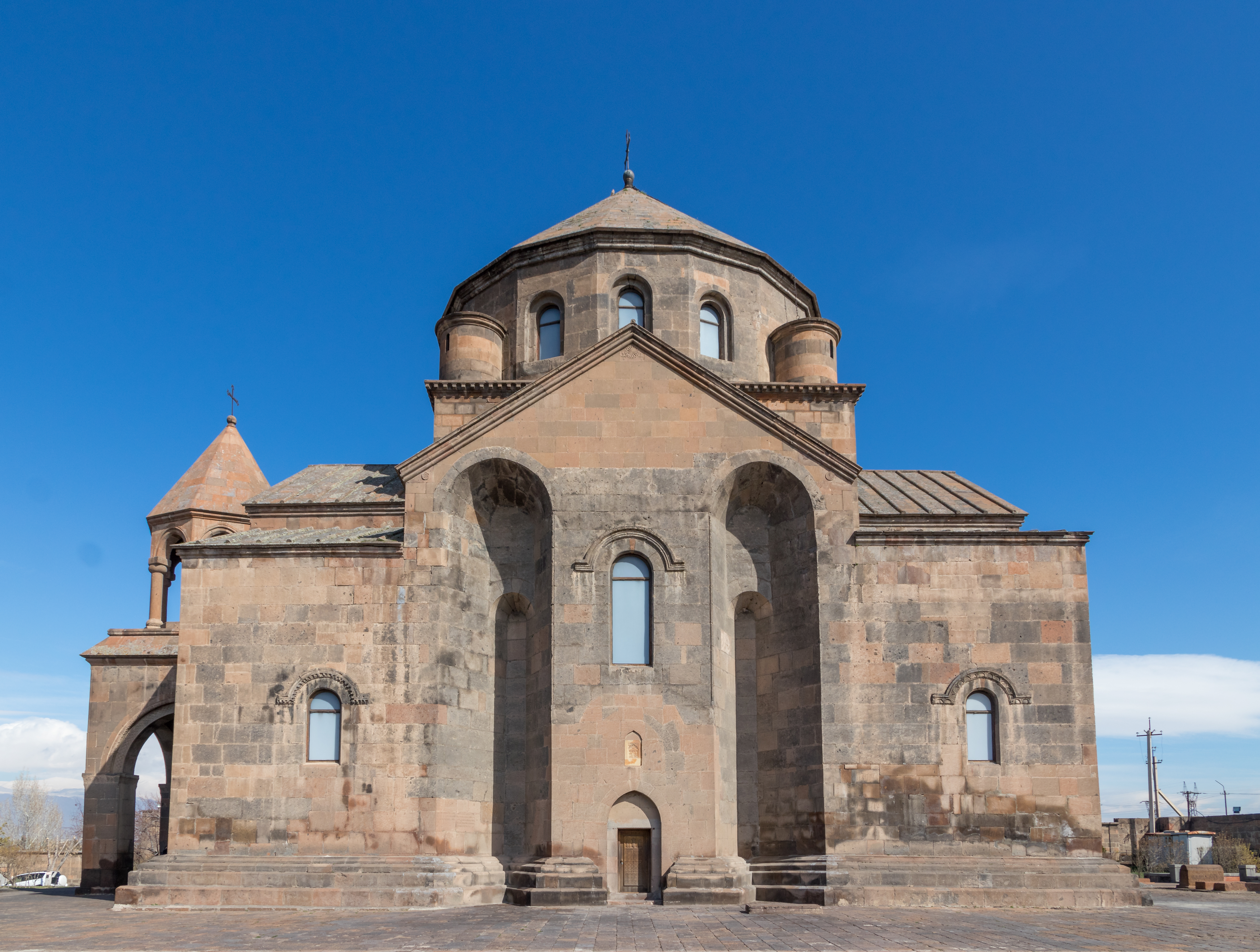 St. Hripsime church in Vagharshapat